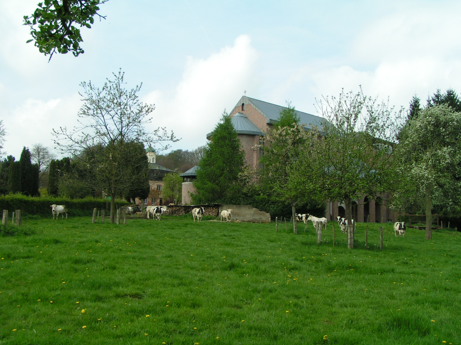 Abbaye de Chevetogne, Belgique : l'église latine